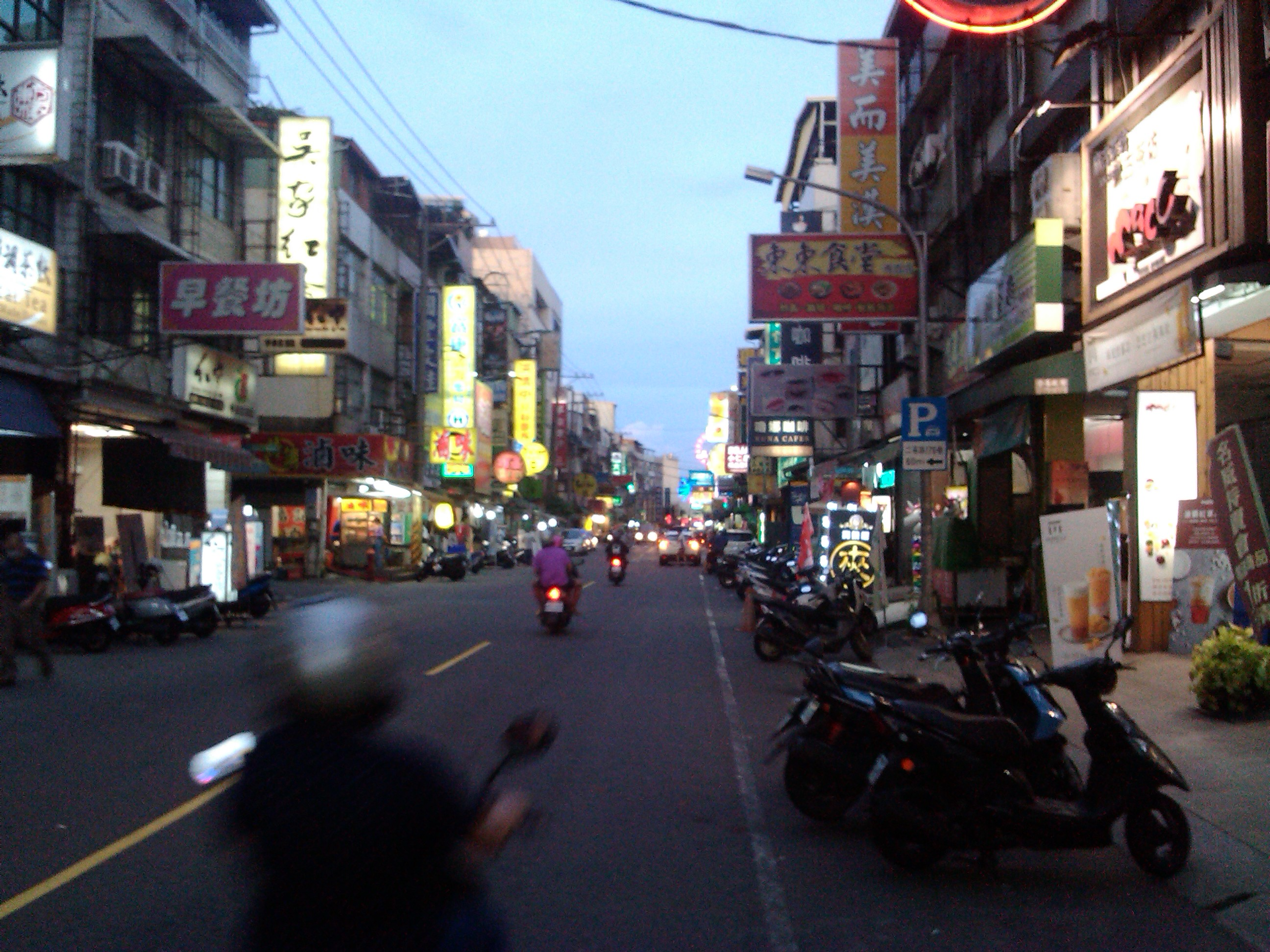 同上